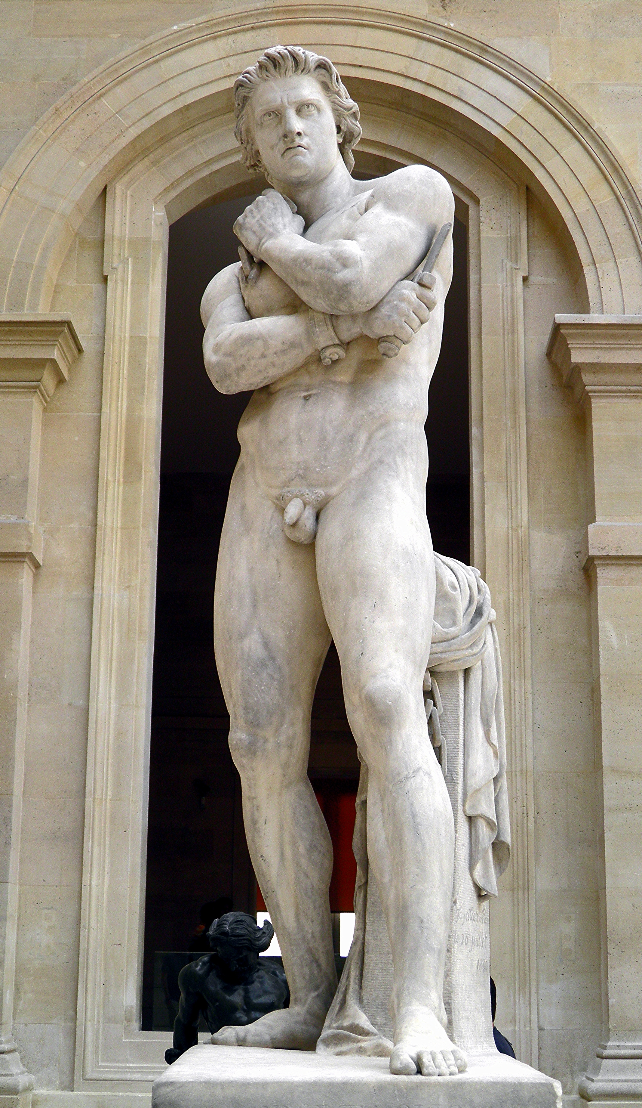 Spartacus, marble sculpture of Denis Foyatier (1830), Louvre Museum